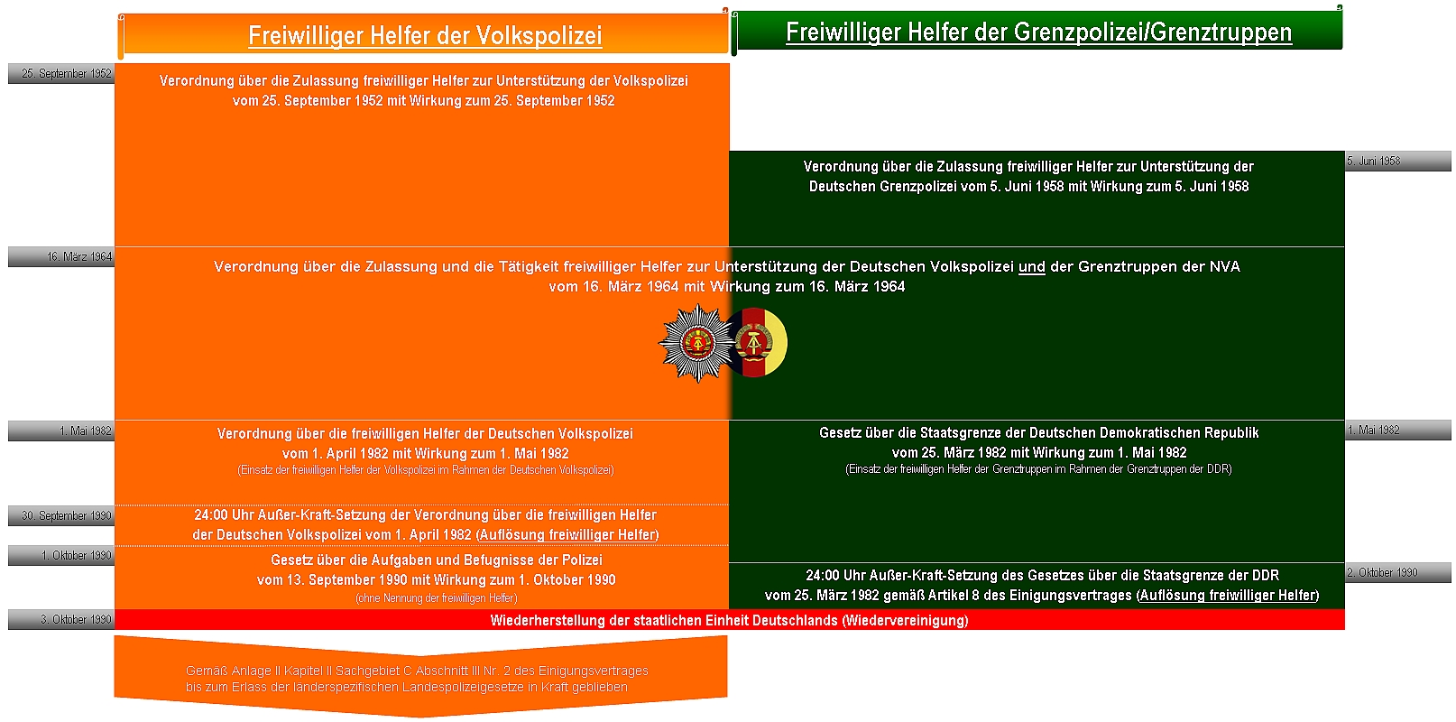 Die Geschichte der freiwilligen Helfer der Volkspolizei bzw. Grenztruppen der DDR bis zur derer Auflösung